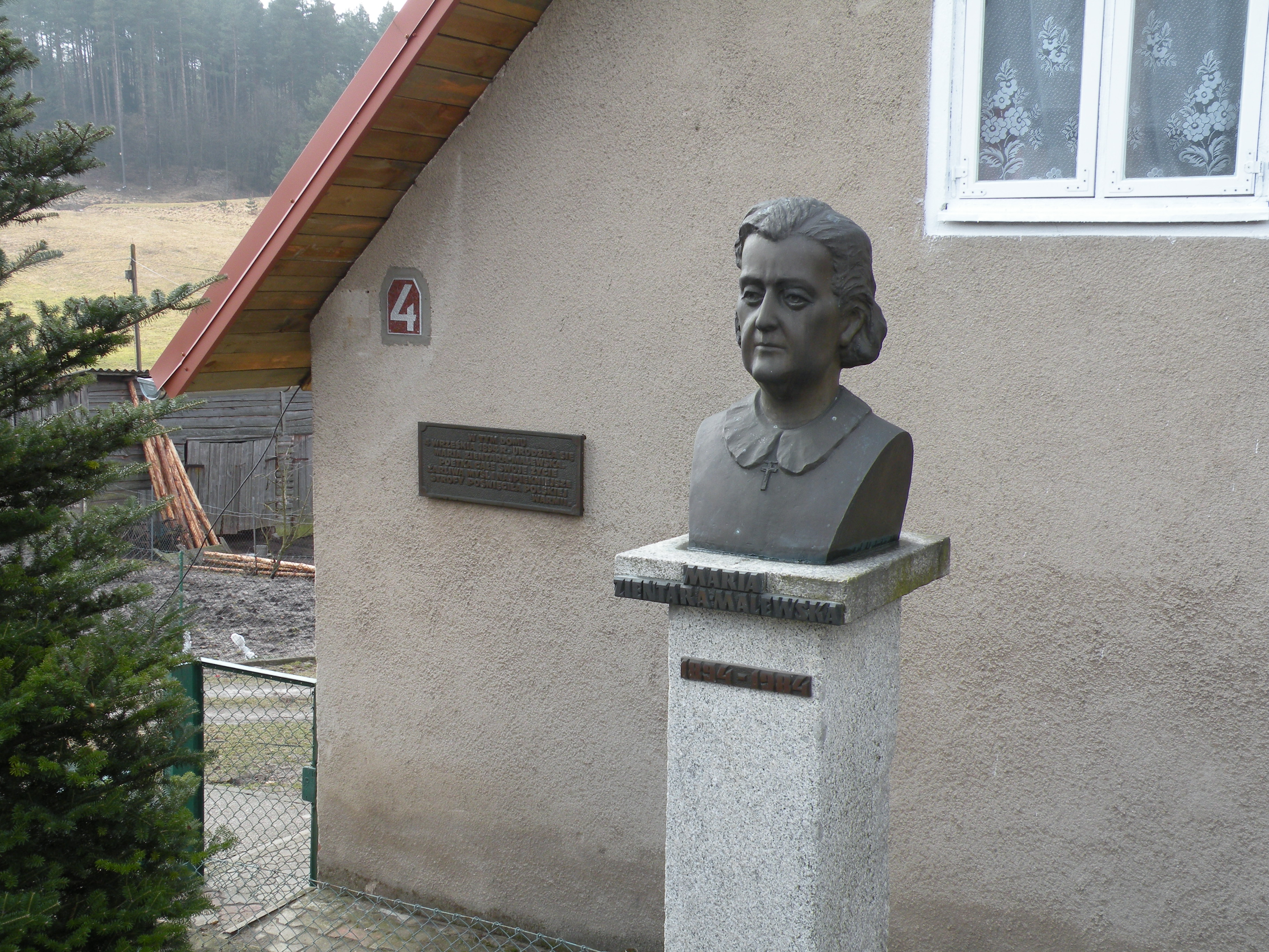 Brąswałd